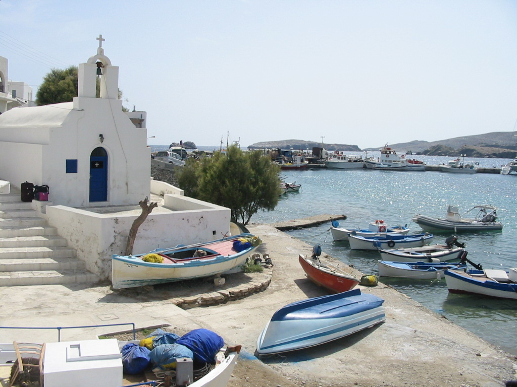 Port de Karavostasi sur Folegandros